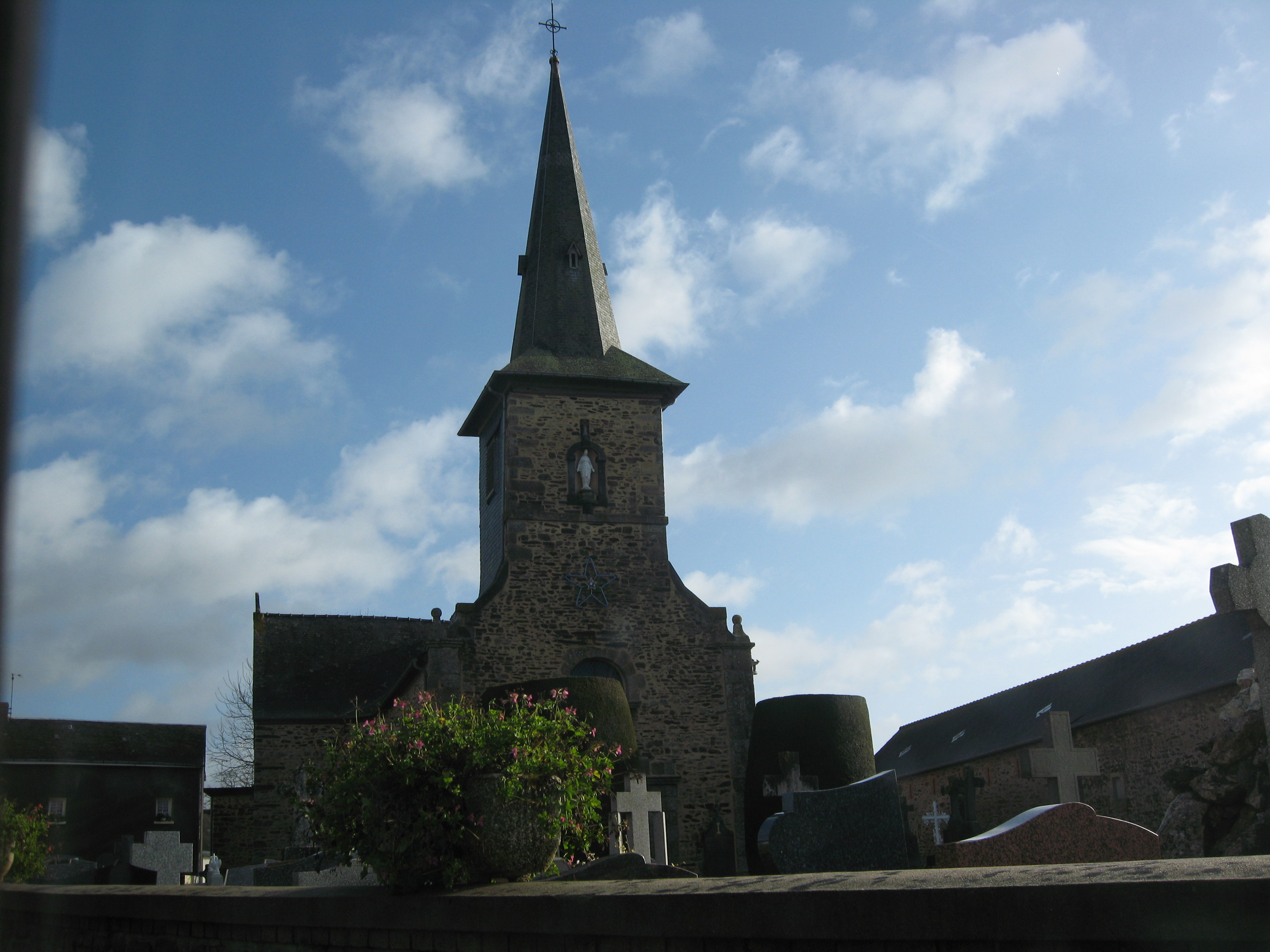 Église Sainte-Marie-Madeleine de Mondevert (Ille-et-Vilaine, Bretagne, France).